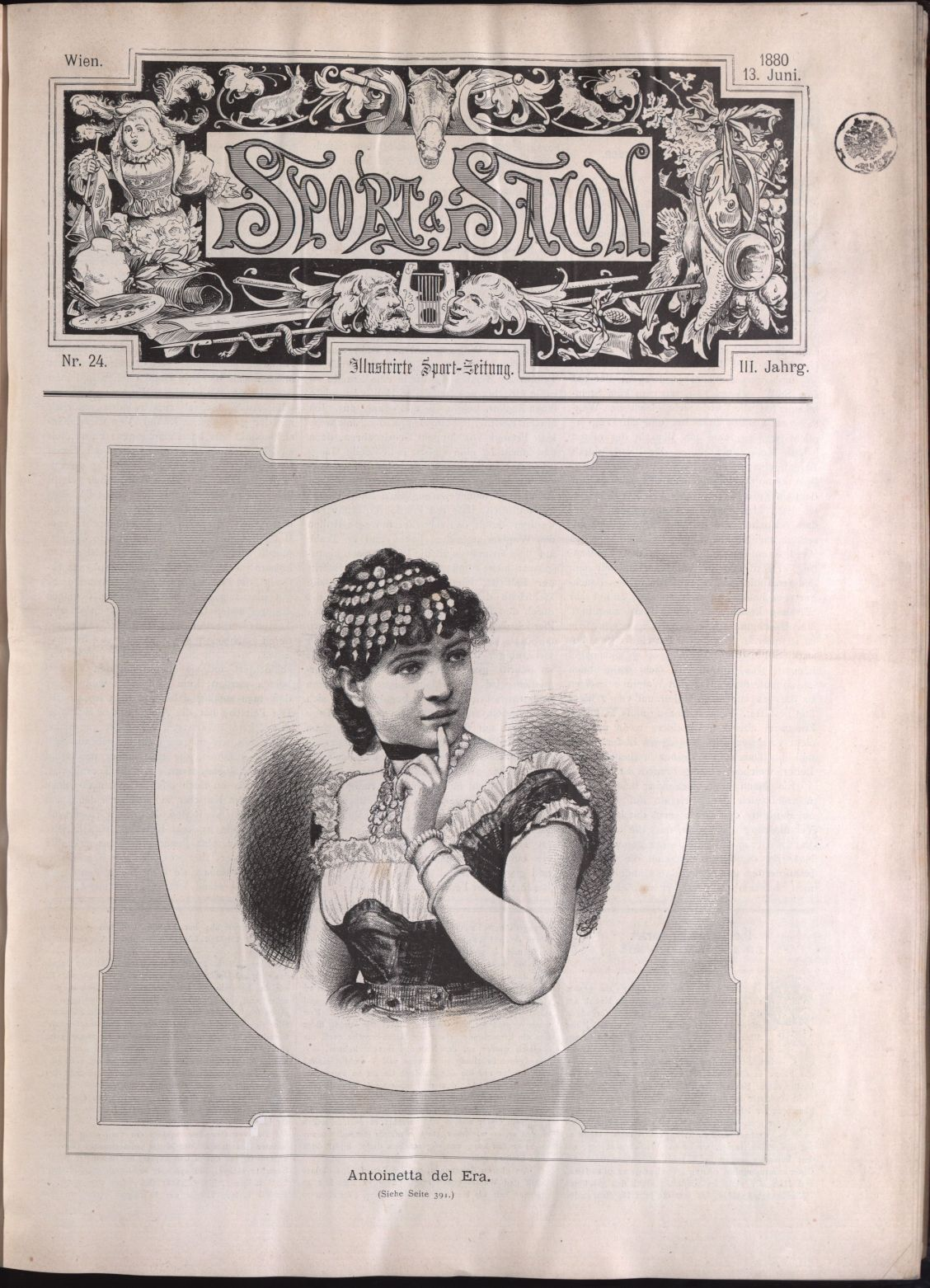 Antonietta Dell'Era Titelblatt Sport und Salon, Wien, 13. Juni 1880